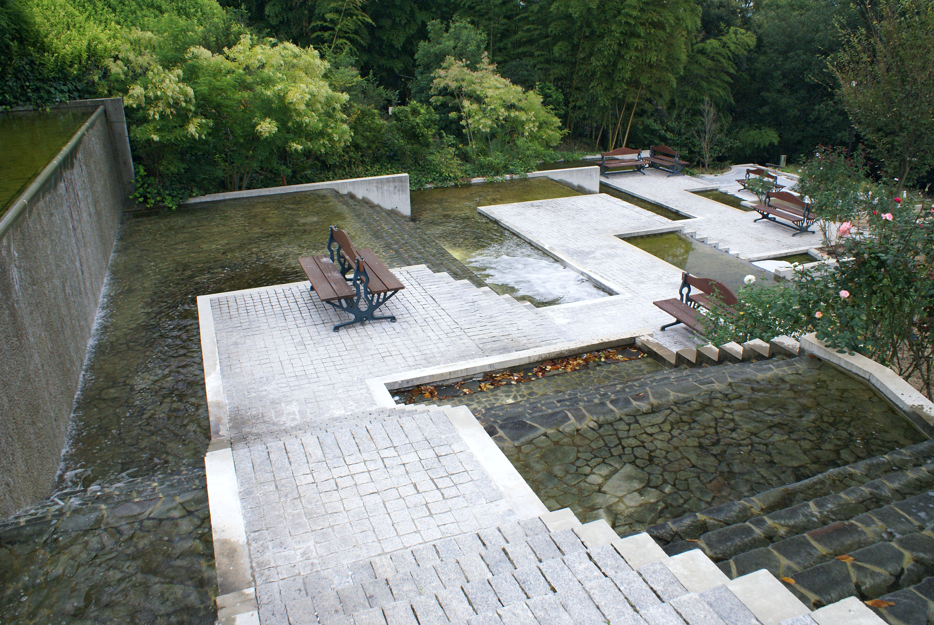 Shikokumura Gallery in Shikokumura, Takamatsu, Kagawa Prefecture, Japan